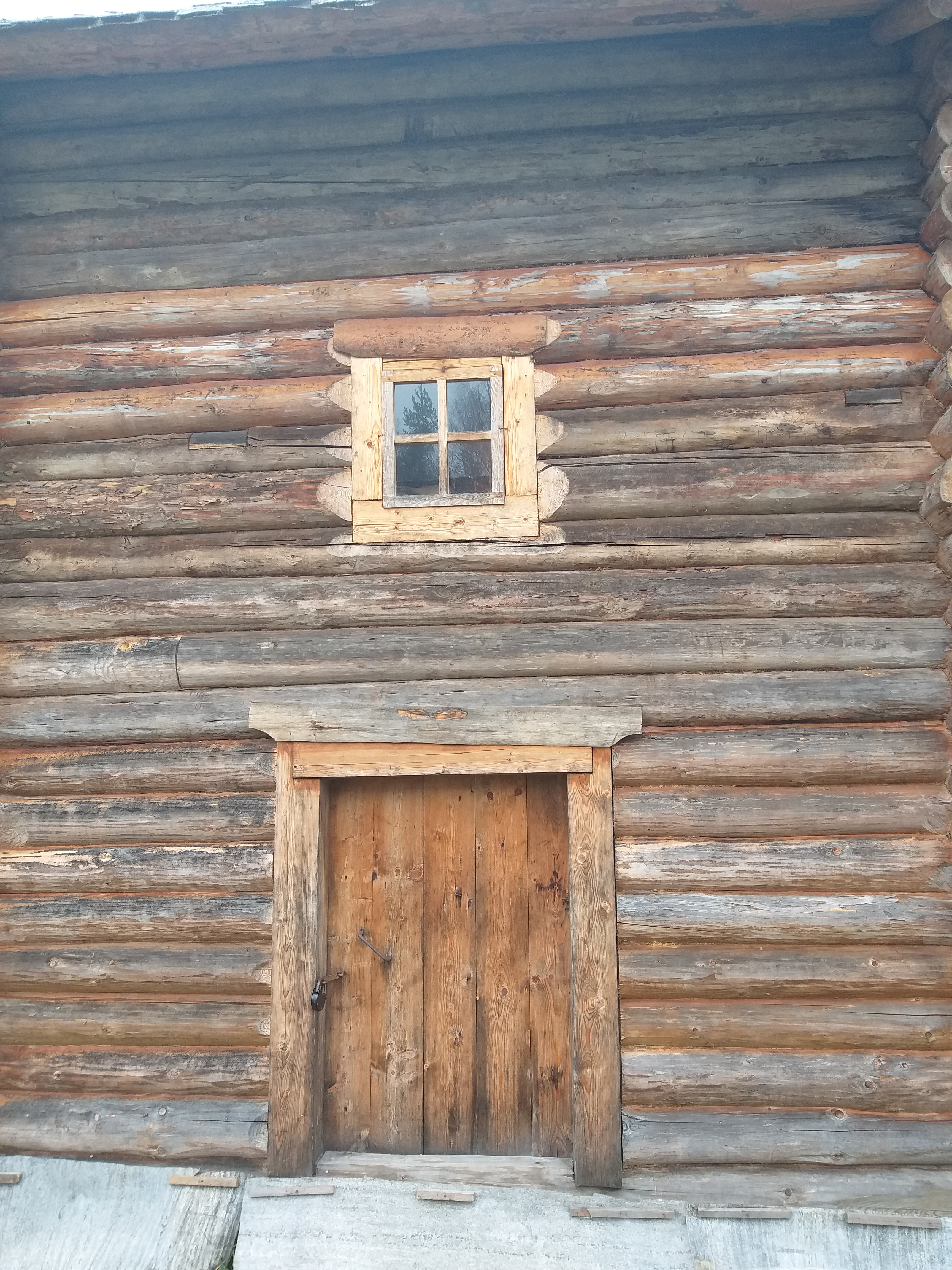 Клеть (сверху) и подклеть (внизу) с внешней стороны в доме Добровольских в Витославлицах